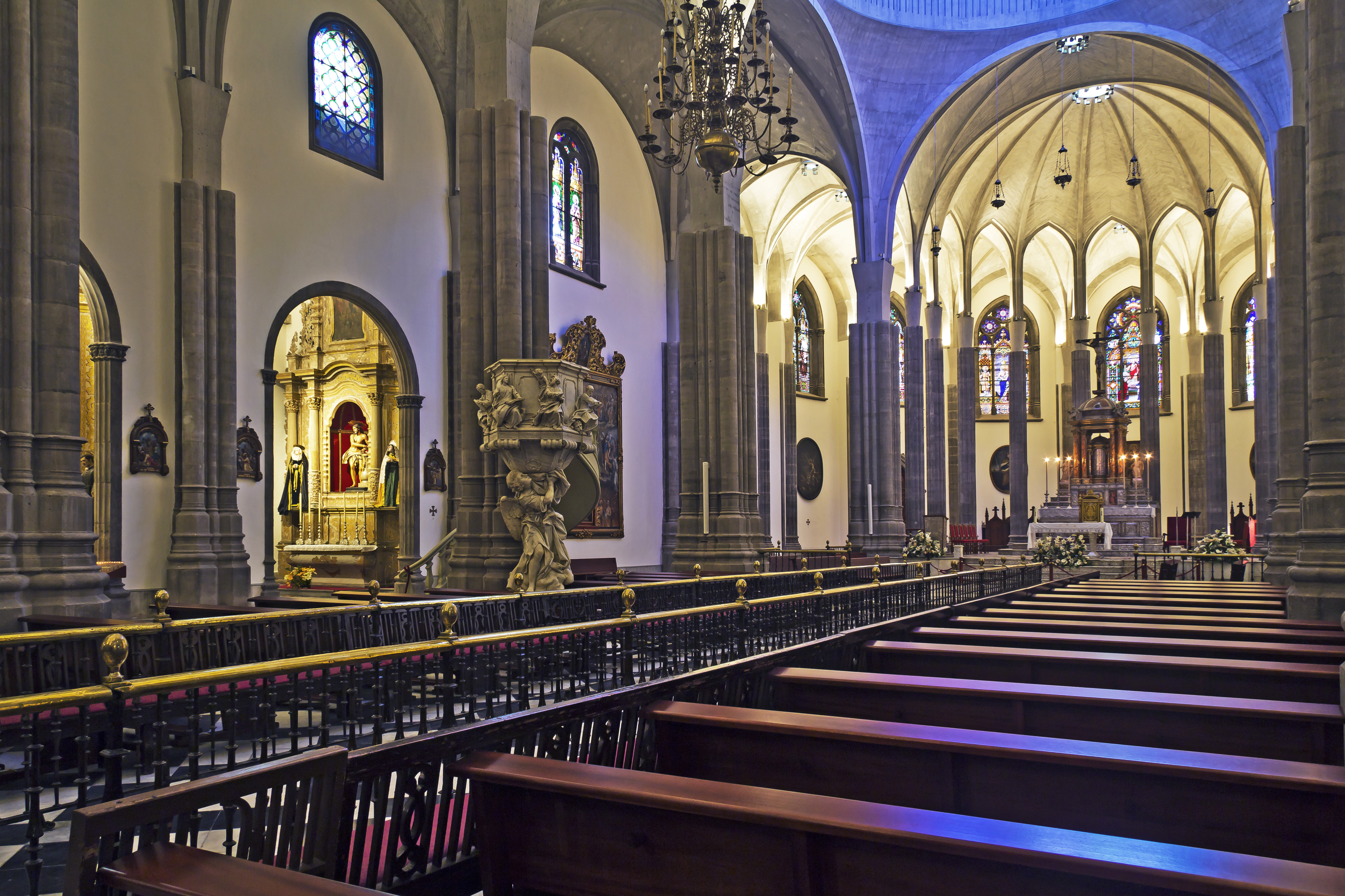 Hauptschiff, Hauptaltar und linkes Seitenschiff der Kathedrale in La Laguna